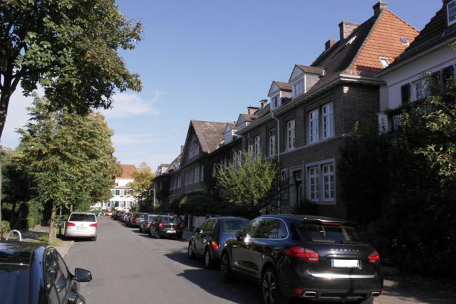 Bremer Sanssouci in Bremen, Gravelottestraße 87Die Denkmalgruppe ist ein geschütztes Kulturdenkmal in der Freien Hansestadt Bremen, mit der Nr. 1403 beim Landesamt für Denkmalpflege registriert.